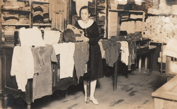 Nje grua duke punuar ne fabriken e Trikotazhit